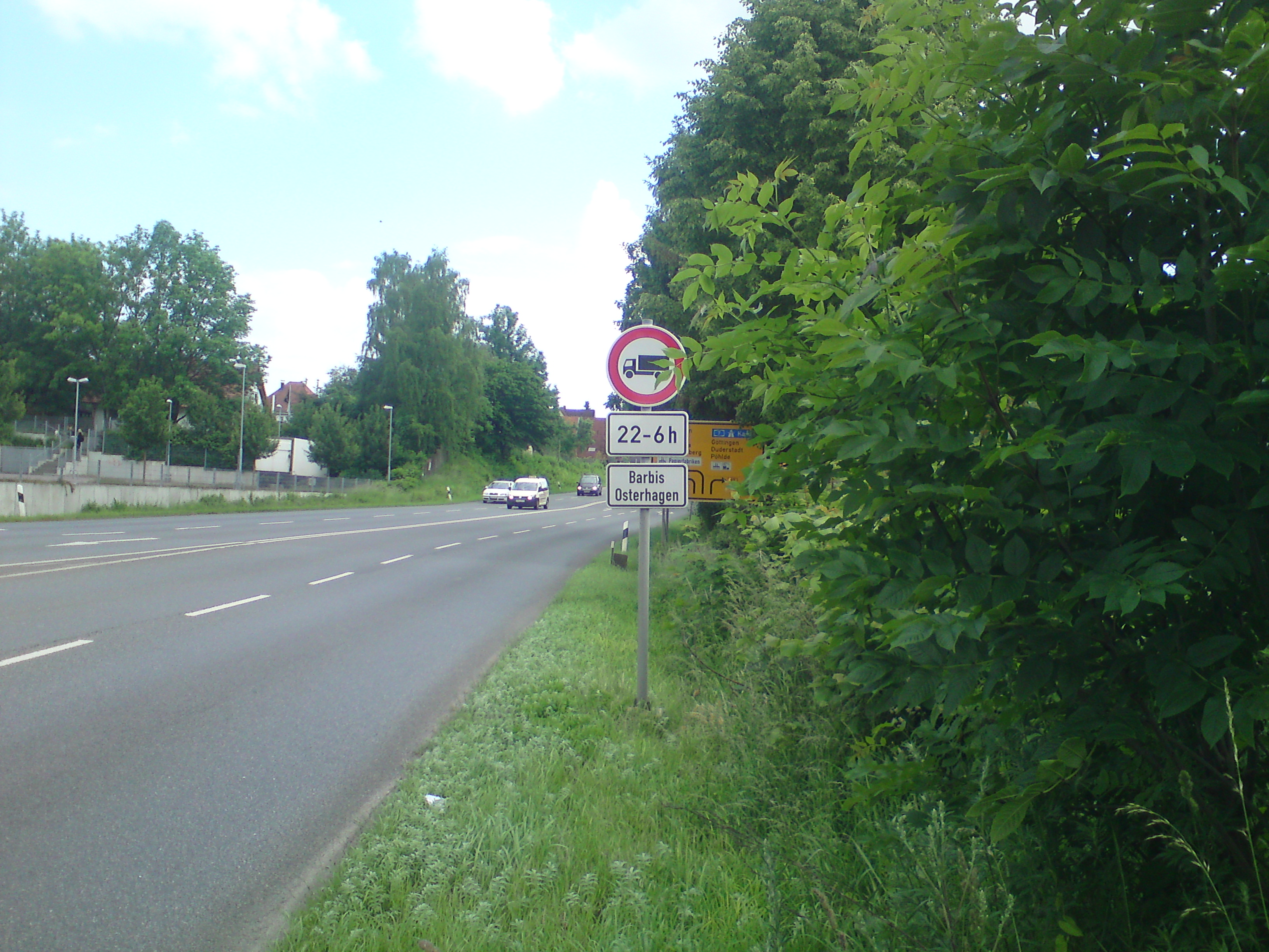 Die Bundesstraße 243 in Herzberg (vor der T-Kreuzung mit der B 27), Fahrtrichtung Nordhausen